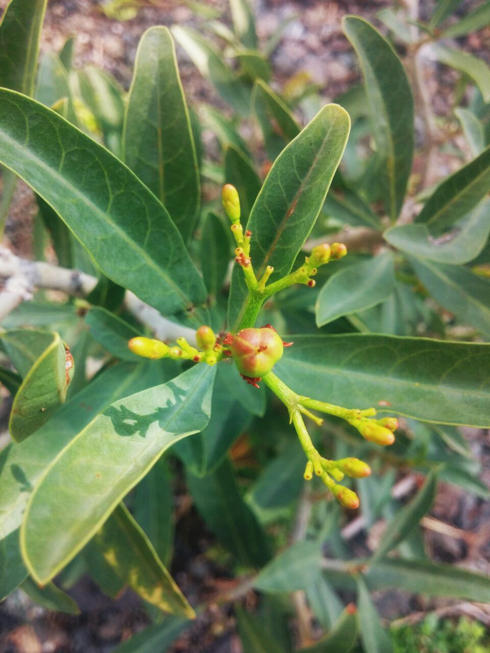 (Jatropha variegata) ثمار شجيره الإبكي